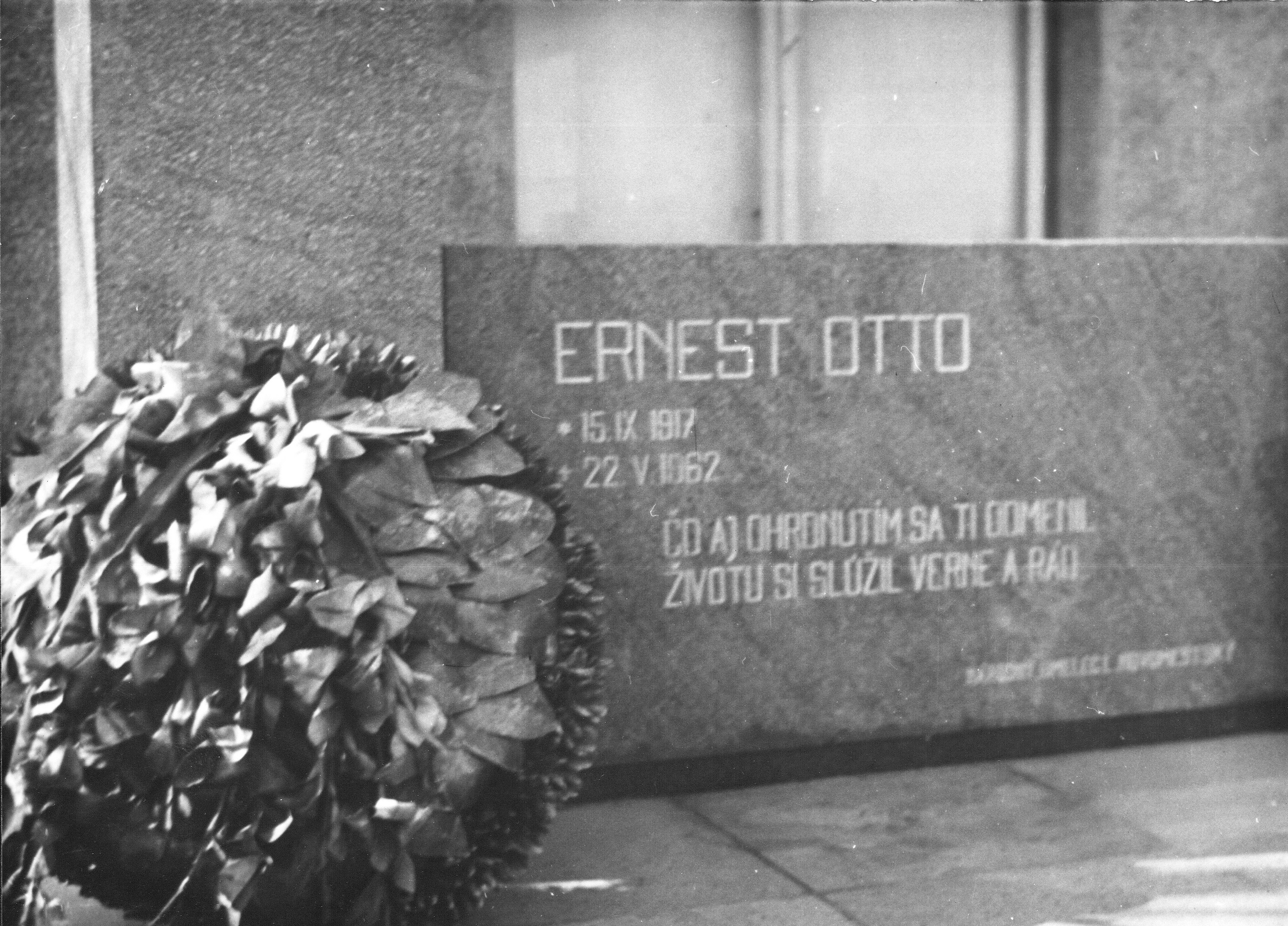 pamaätník pred základnou školou